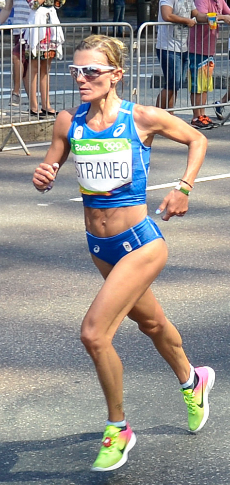 Rio de Janeiro - A Maratona Feminina Olímpica, que passa pelas ruas da cidade, e o Boulevard Olímpico lotam a região central da cidade neste domingo. (Tânia Rêgo/Agência Brasil).